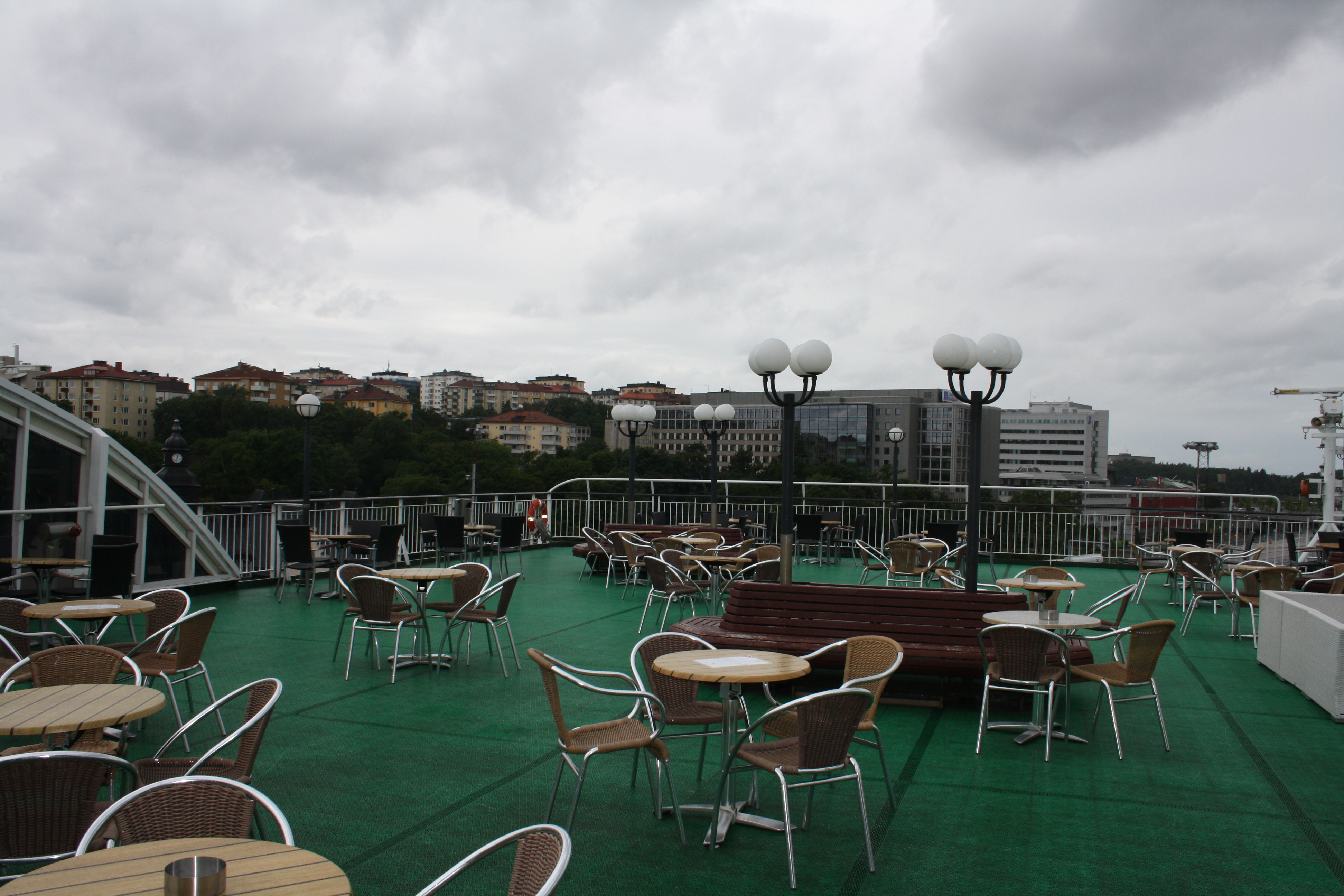 Ute på Romantika